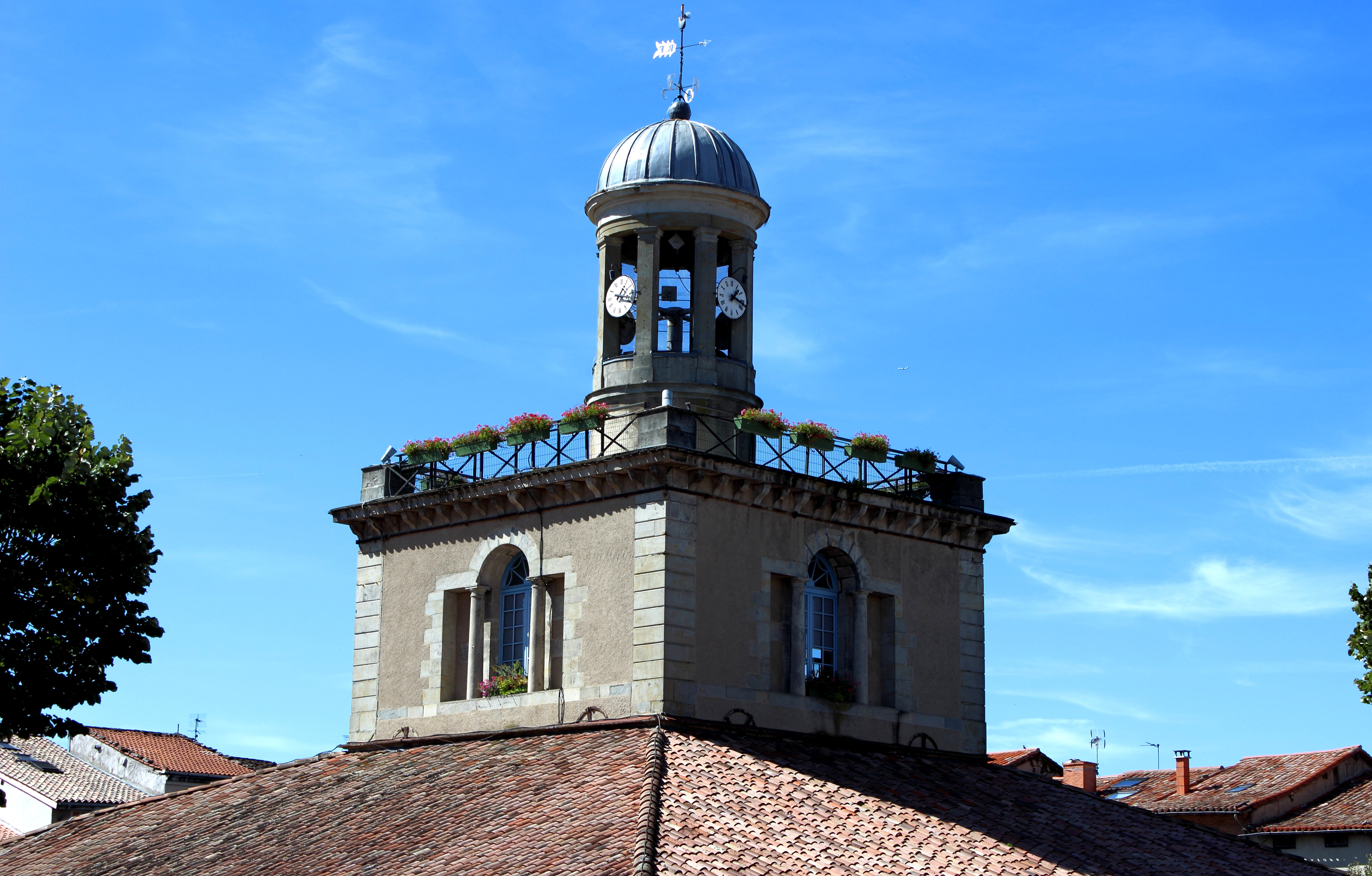 Halle de Revel (Classé) .